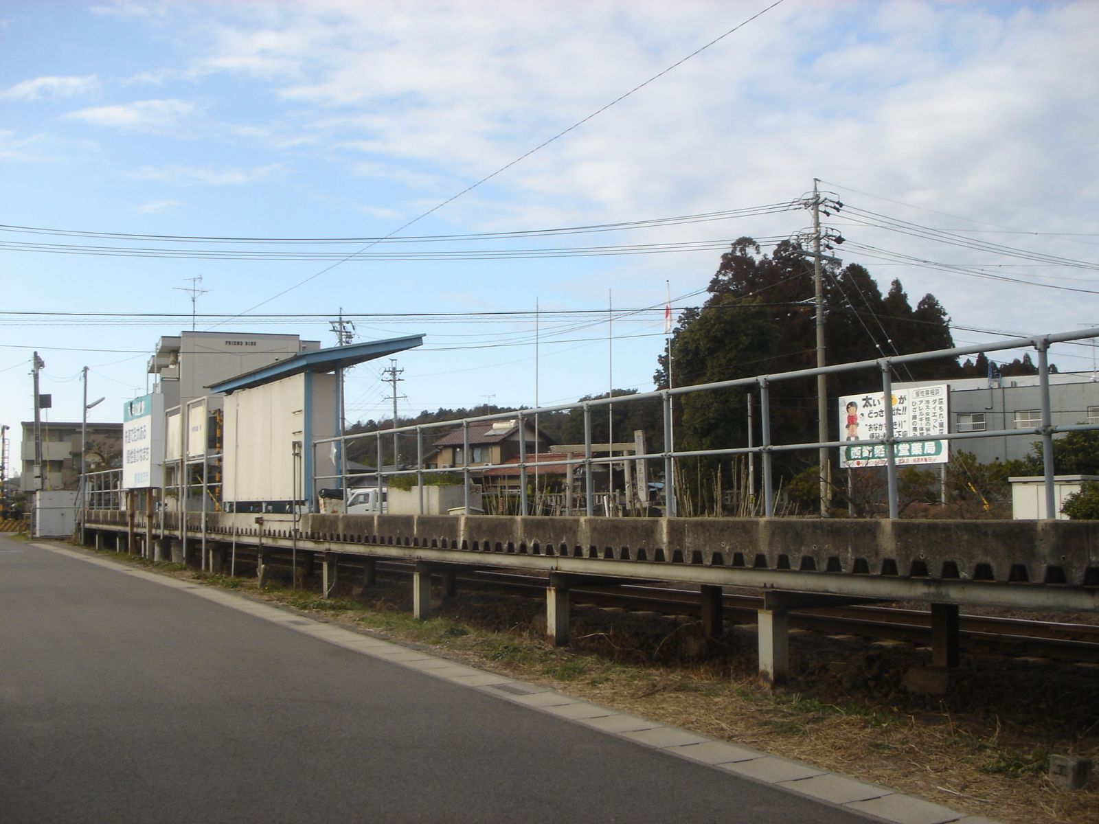 Maehira-koen Station (長良川鉄道越美南線、前平公園駅）,Minokamo,Gifu,Japan(岐阜県美濃加茂市)で撮影。